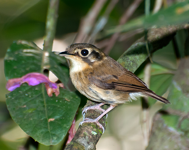 BRegistro-SP - Brasil